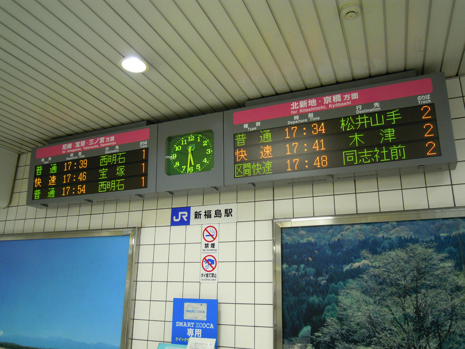 JR Shinfukushima station